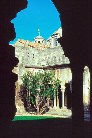 Claustro de San Trófimo